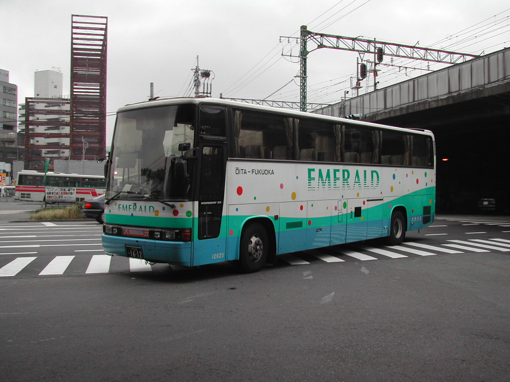 他路線転用後 博多駅交通センター出口にて撮影